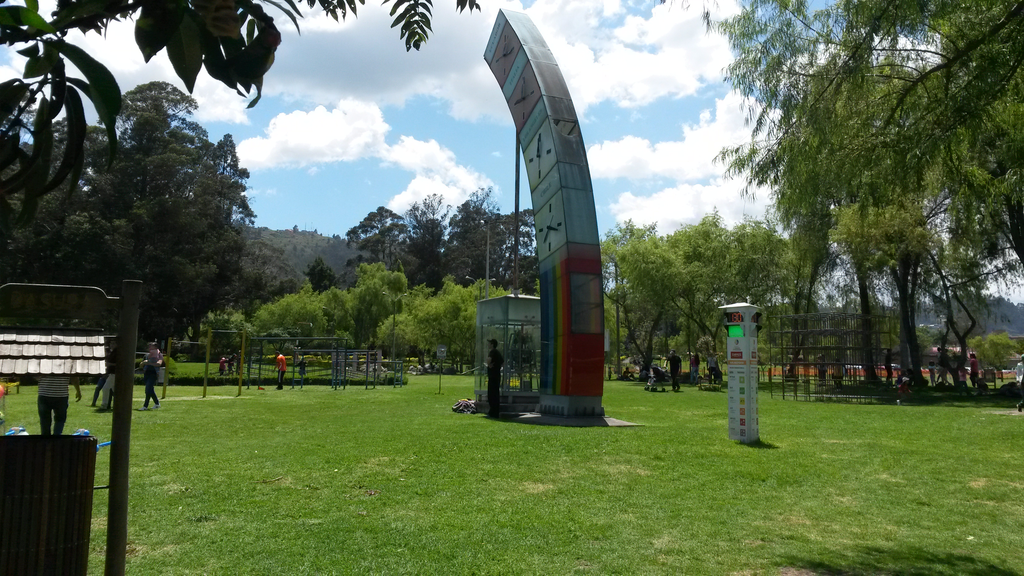 Parko "El Paraíso" Kvenko - Ekvadoro